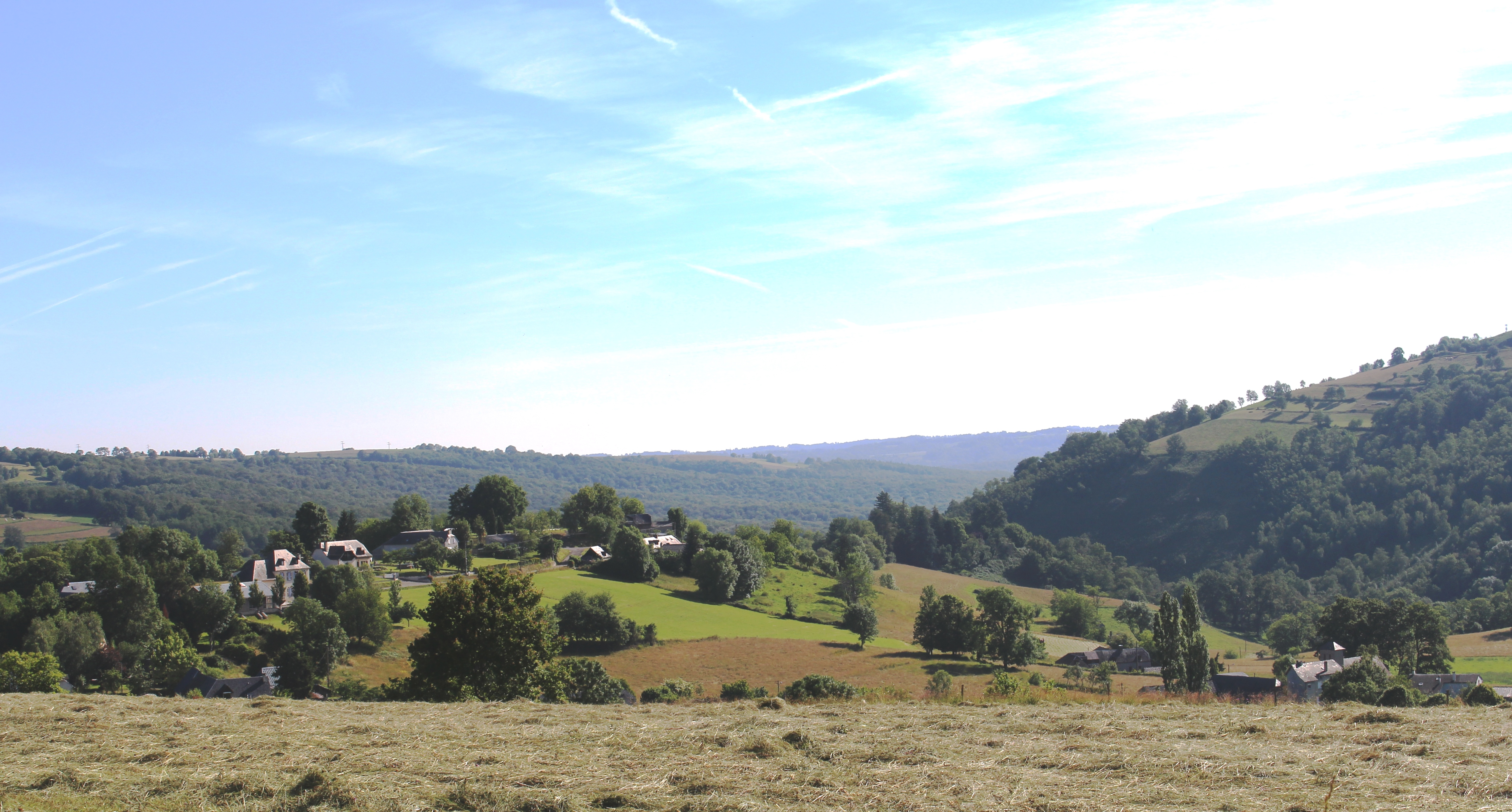 Argelès-Bagnères (Hautes-Pyrénées)